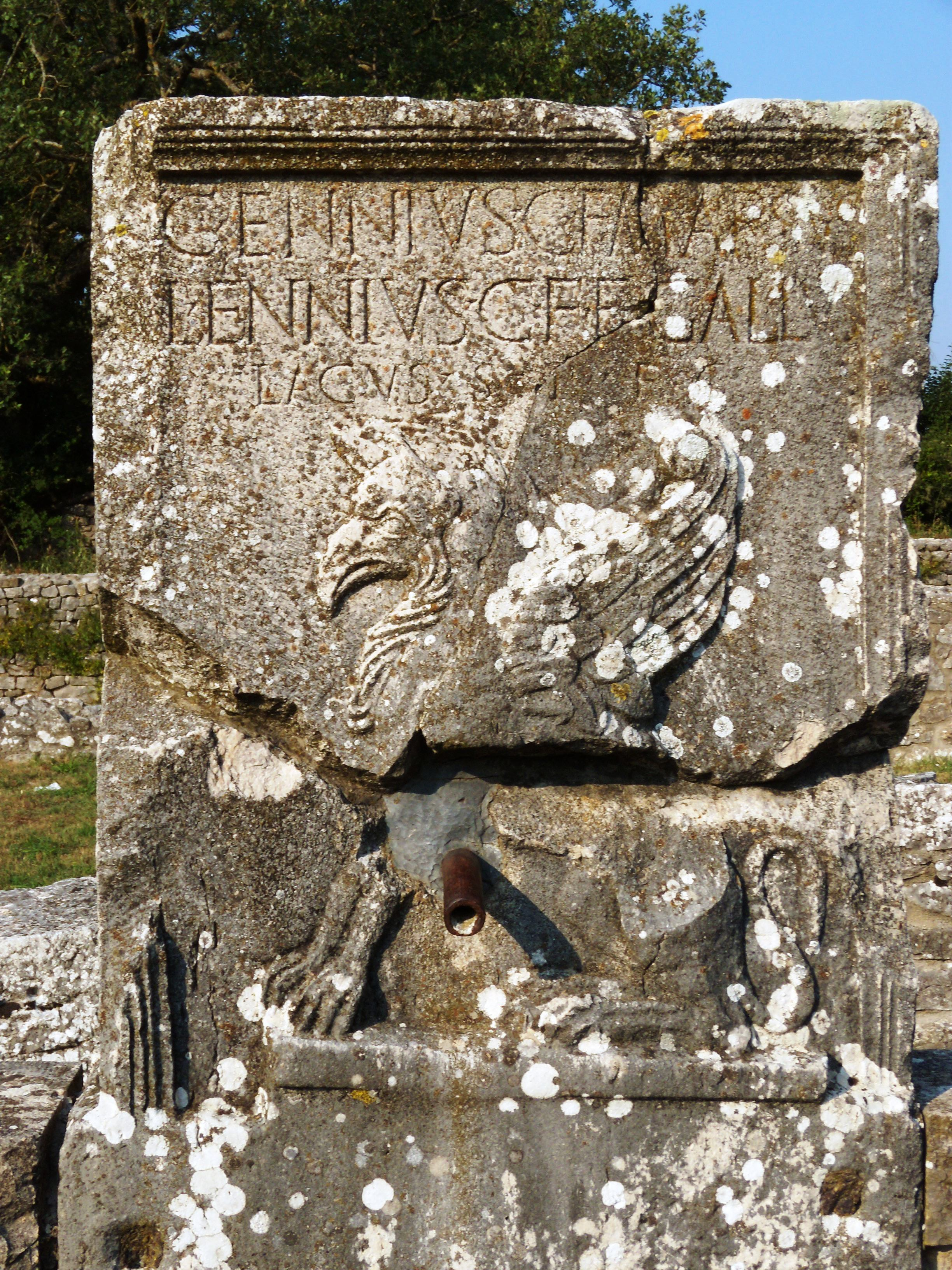 Scavi archeologici di Saepinum (Italy): fontana del Grifo (epoca romana).